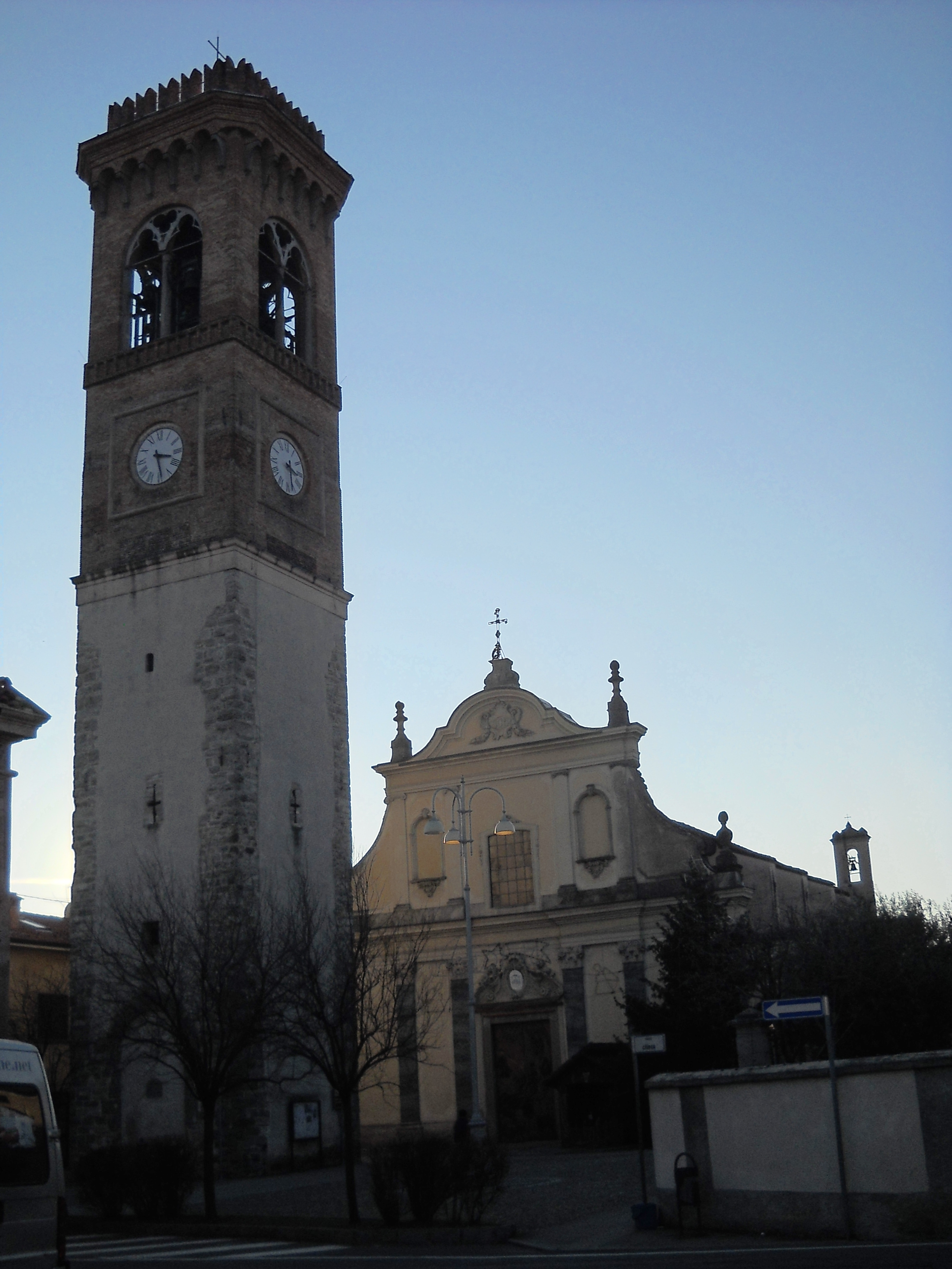 Chiesa e campanile di Comun Nuovo, Bergamo, Italia